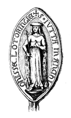 Judith d'Oehningen était l'épouse du comte Adalbert II de Metz